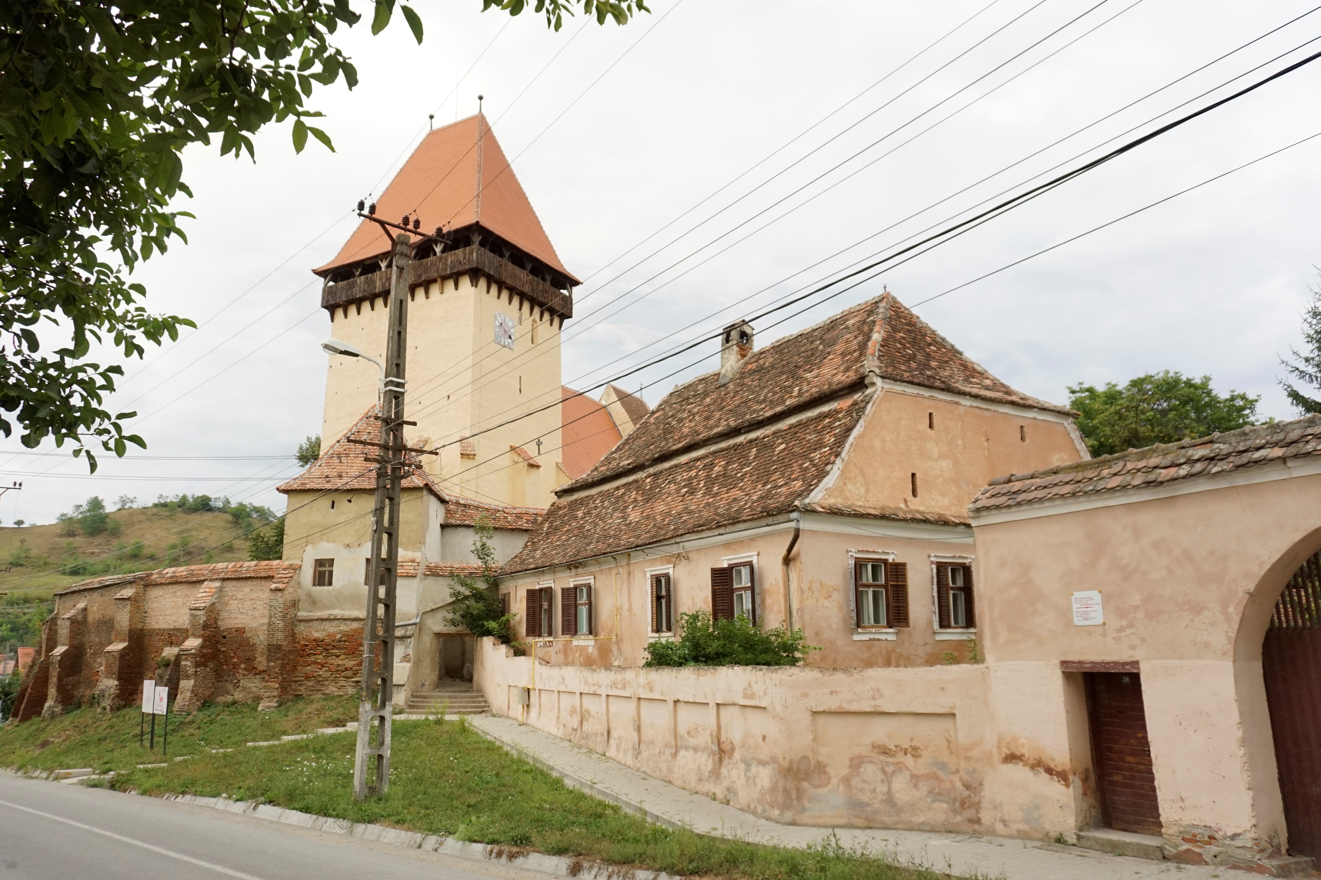 Die Kirchenburg in Eibesdorf (Ighișu Nou) mit dem Pfarrhaus im Vordergrund.